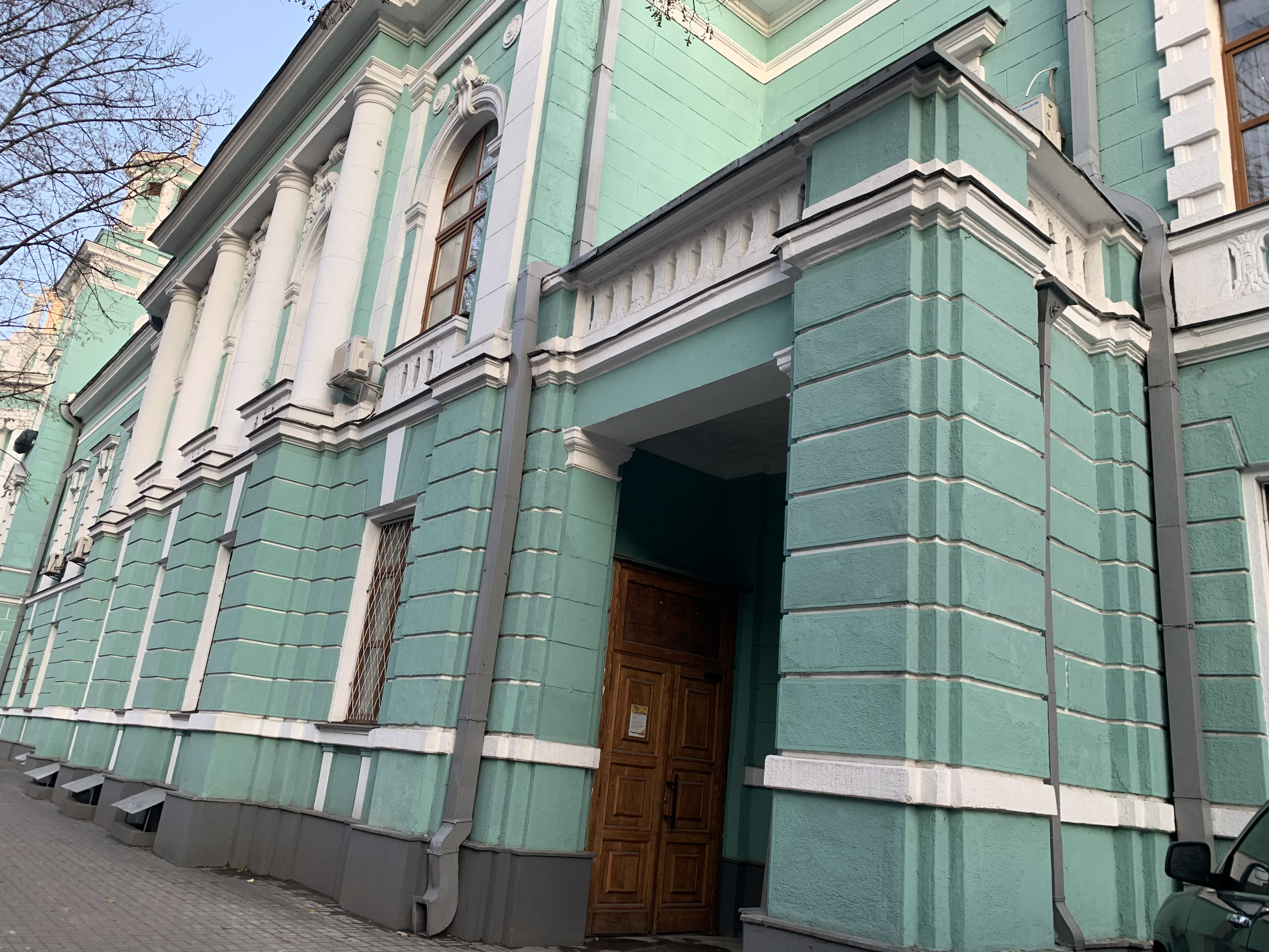 Кримський Дім, будівля за адресою Омеляновича-павленка-Павленко, 9